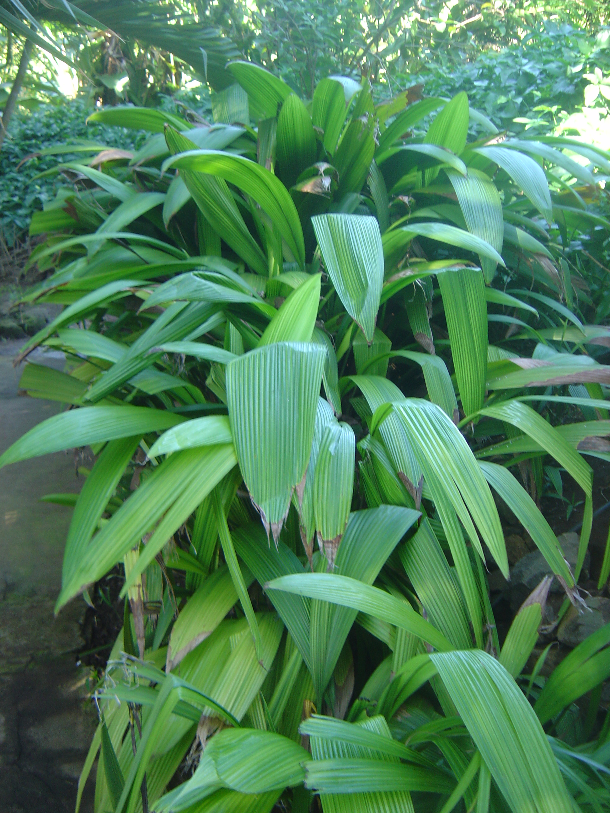 Curculigo angustifolia